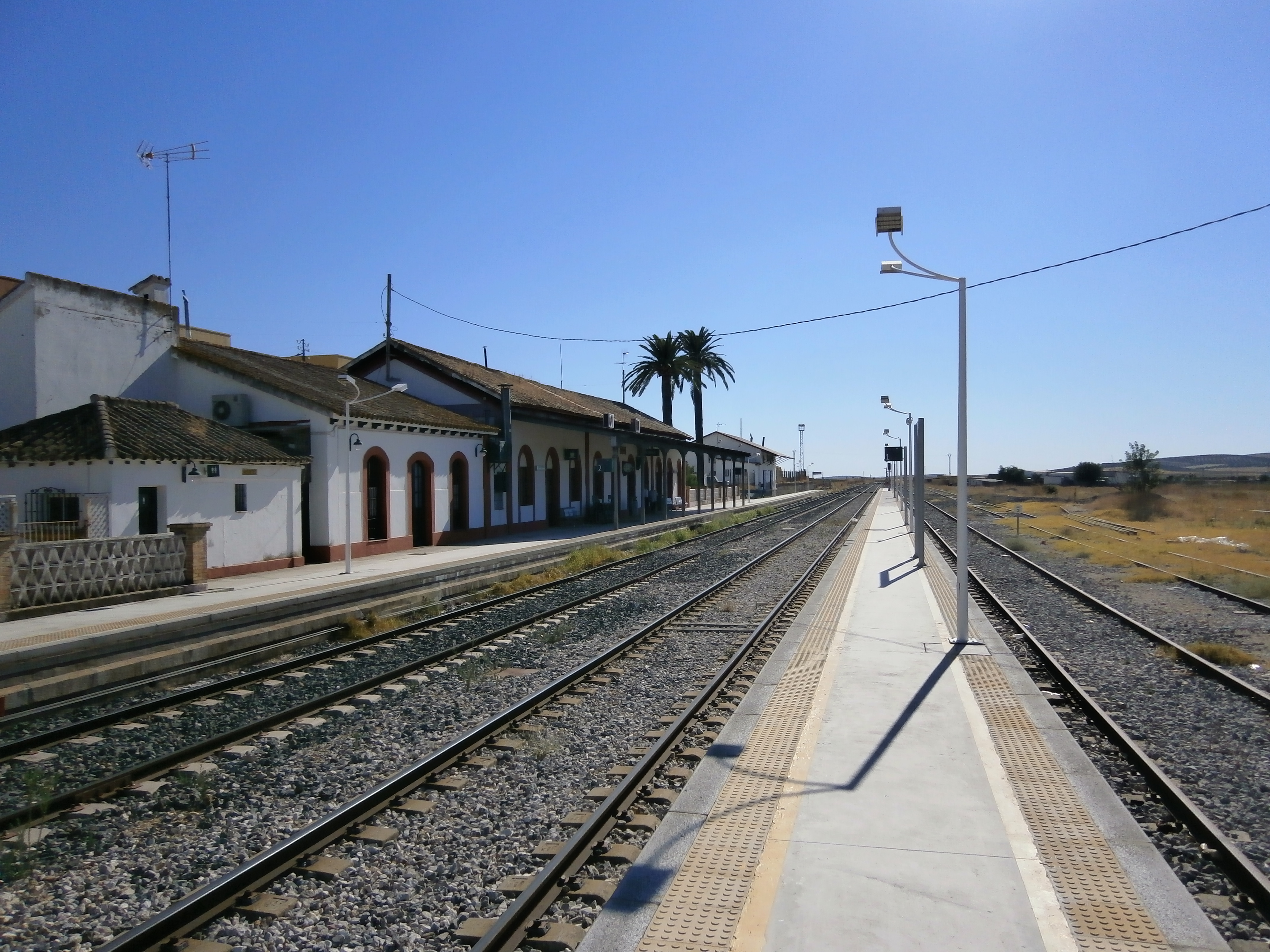 Estacion de Marchena andenes